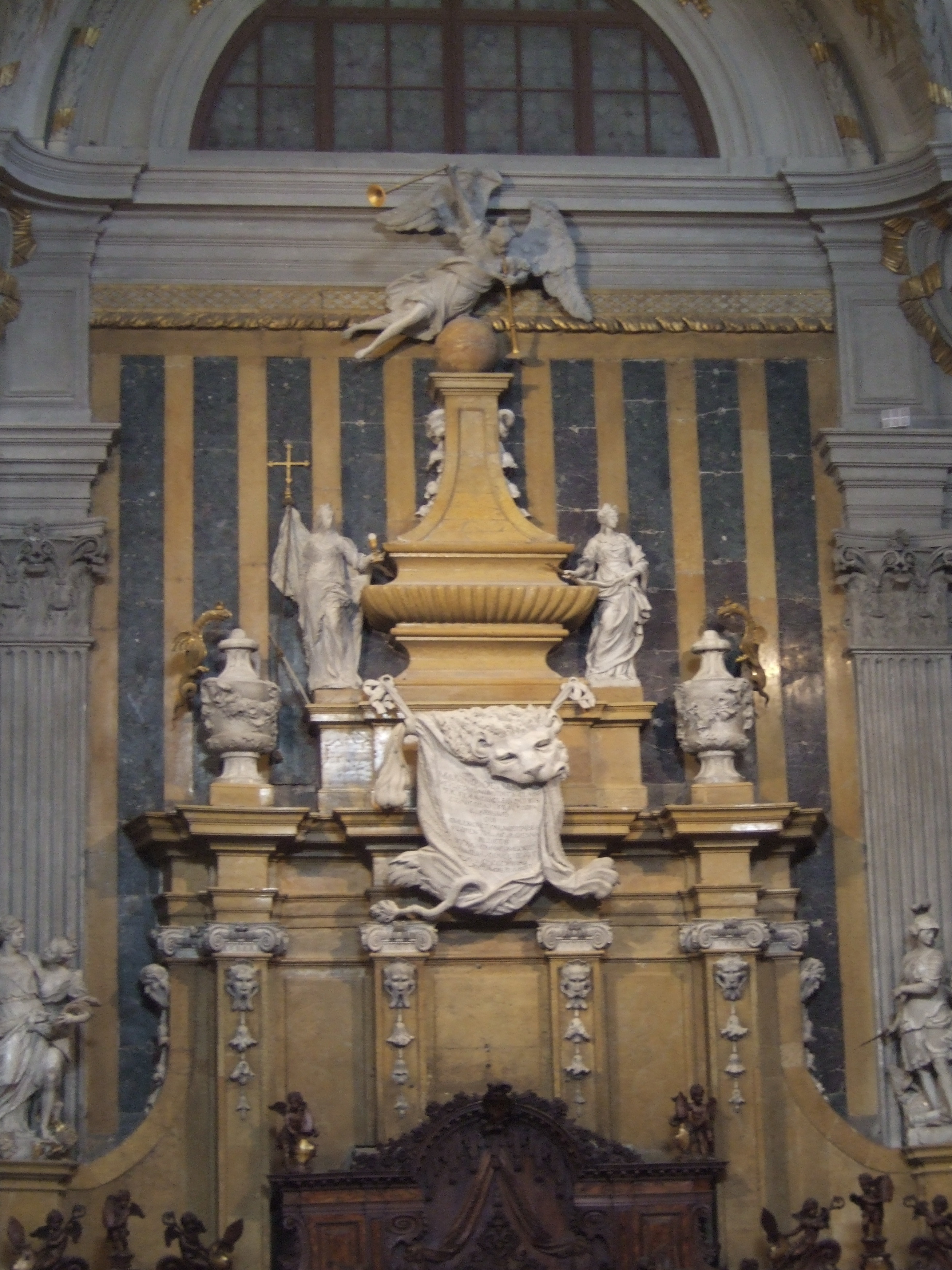 Duomo di Udine - Presbiterio - Mausoleo Manin sul lato sinistro